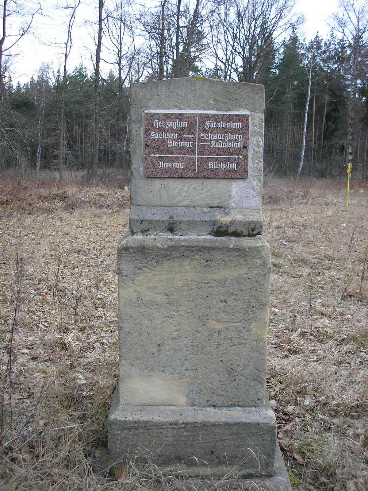 Grenzstein an der B87 bei Ilmenau, rechts Schwarzburg-Rudolstadt, links Sachsen-Weimar-Eisenach